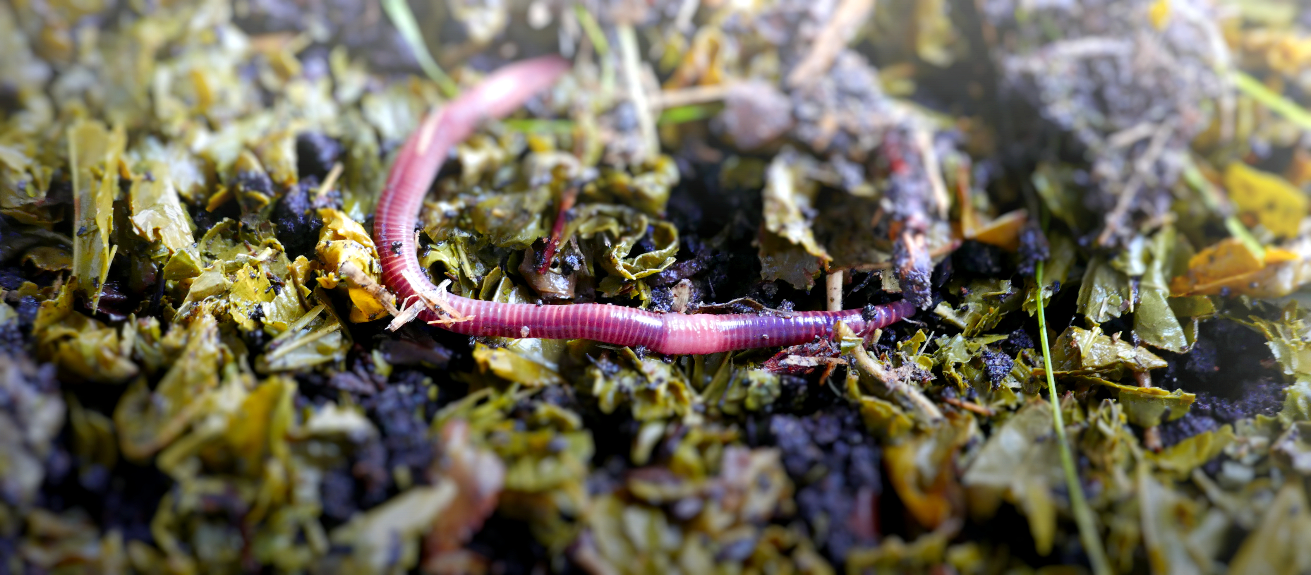 Dżdżownica kalifornijska (eisenia foetida) z widocznym siodełkiem, w ziemi zmieszanej z liśćmi zielonej herbaty